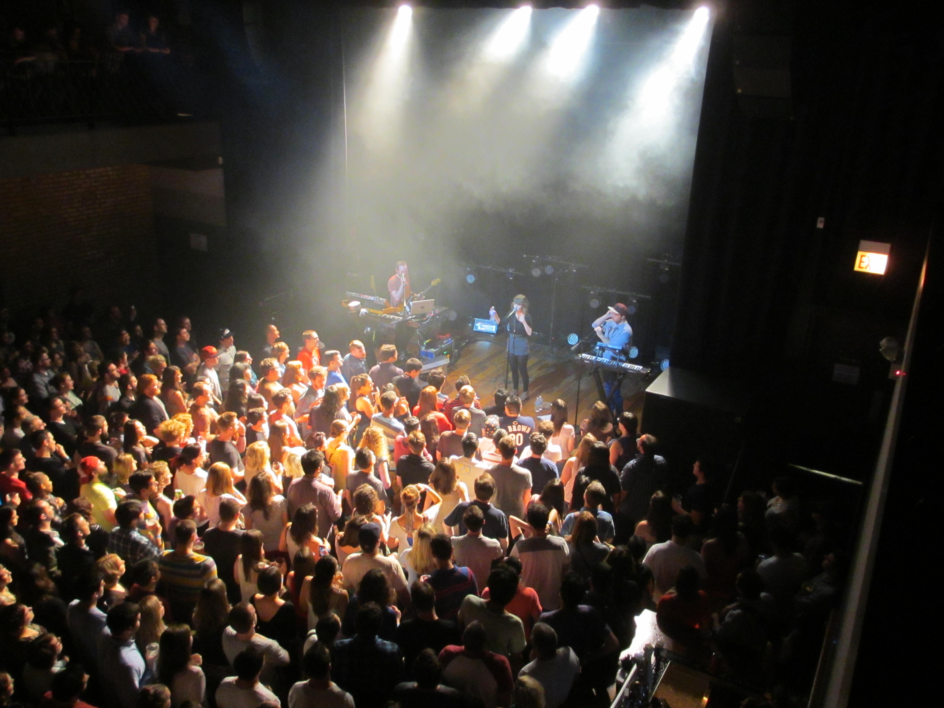 CHVRCHES @ Lincoln Hall, Chicago, 6/11/2013